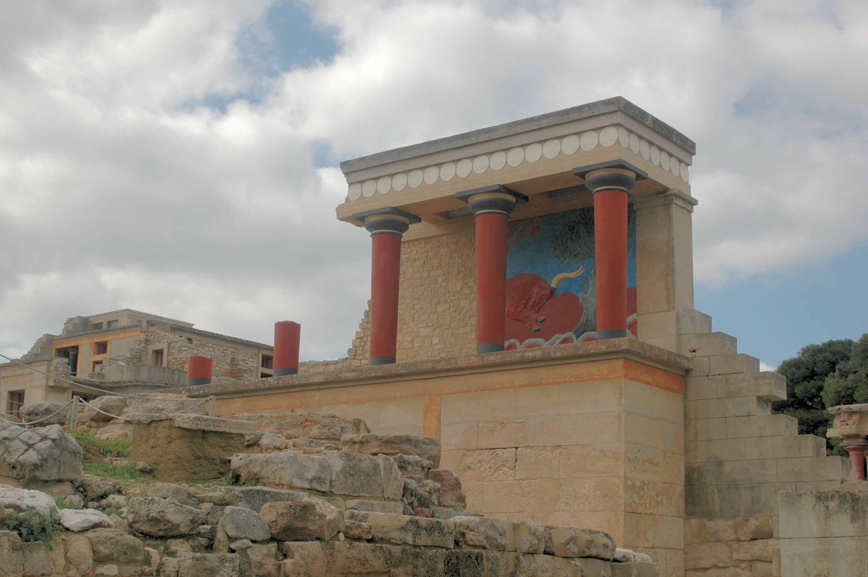 Knossos, palais. Photo prise par Harrieta171 le 28/01/06